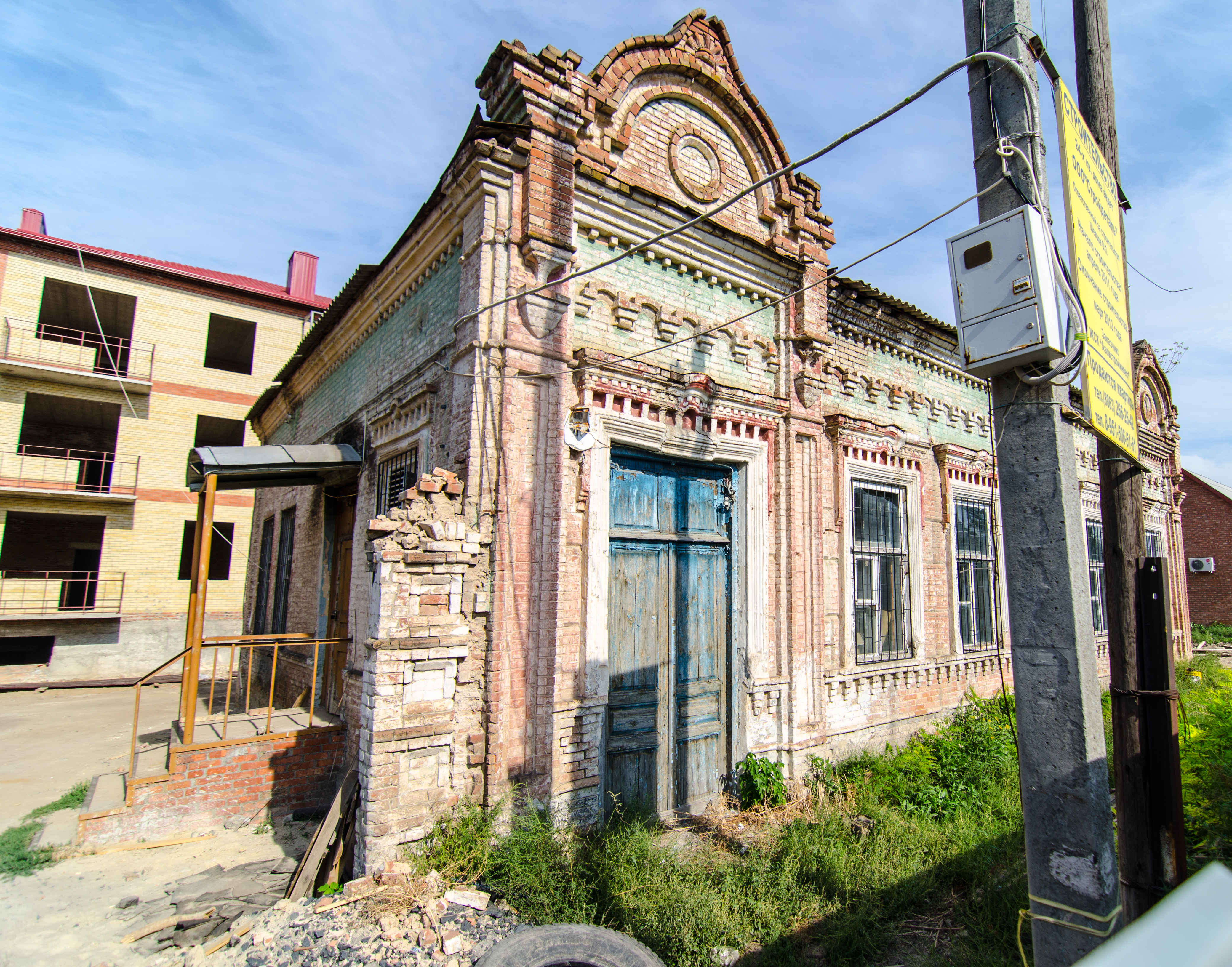 Здание 1-й городской управы. По состоянию на сентябрь 2012 г. здание обнесено забором, медленно разрушается.